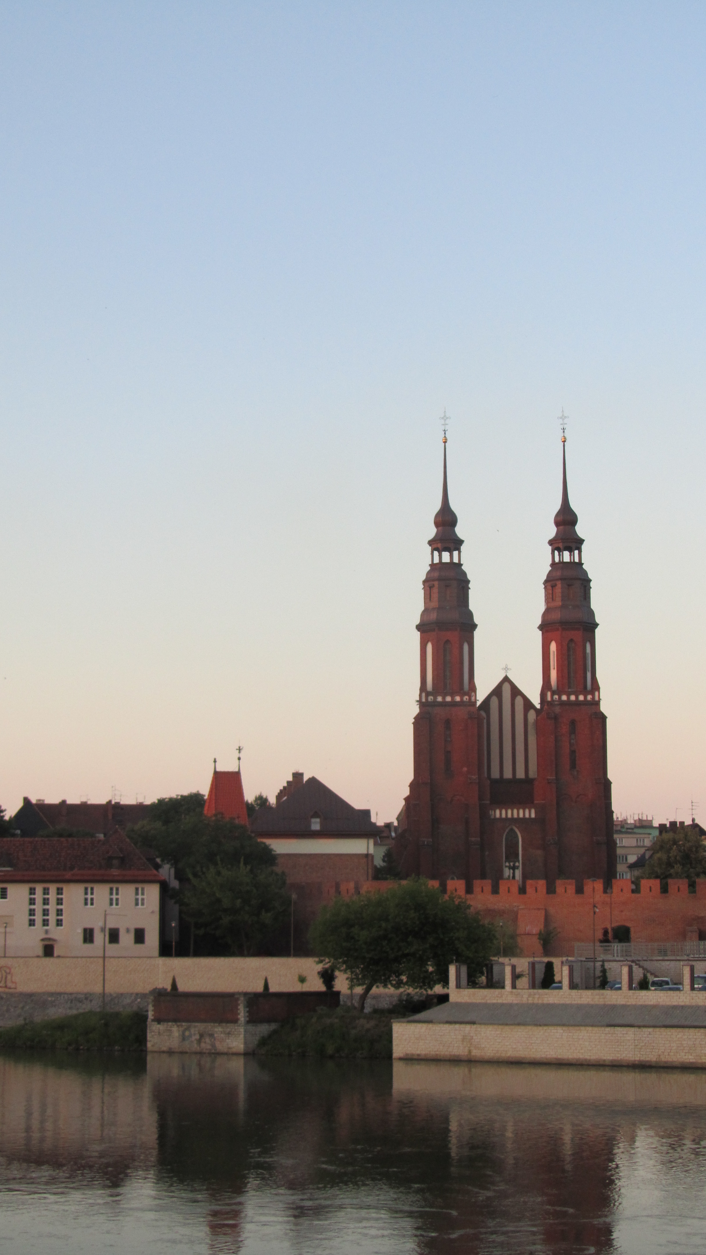 Kathedrale Opole